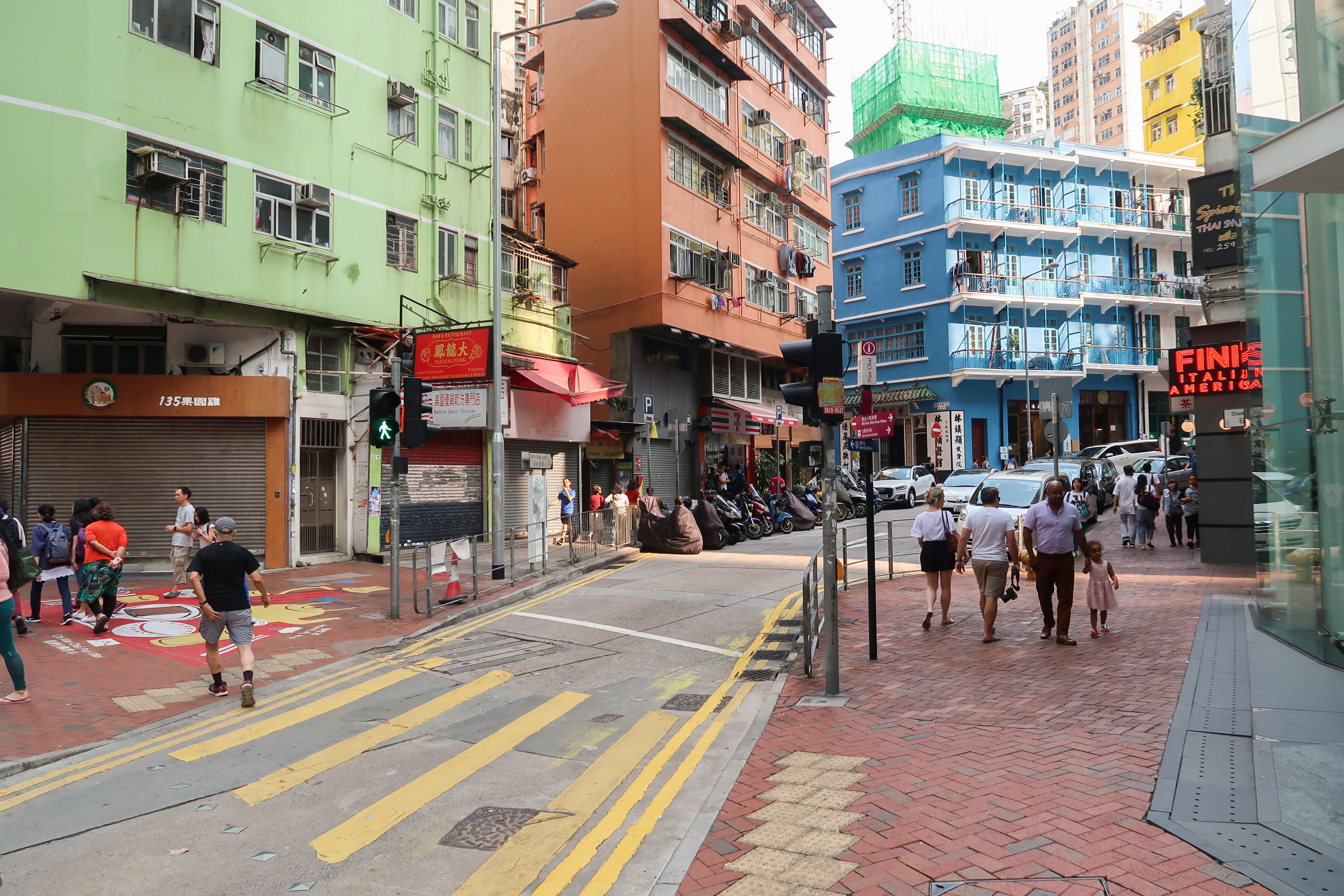 Stone Nullah Lane